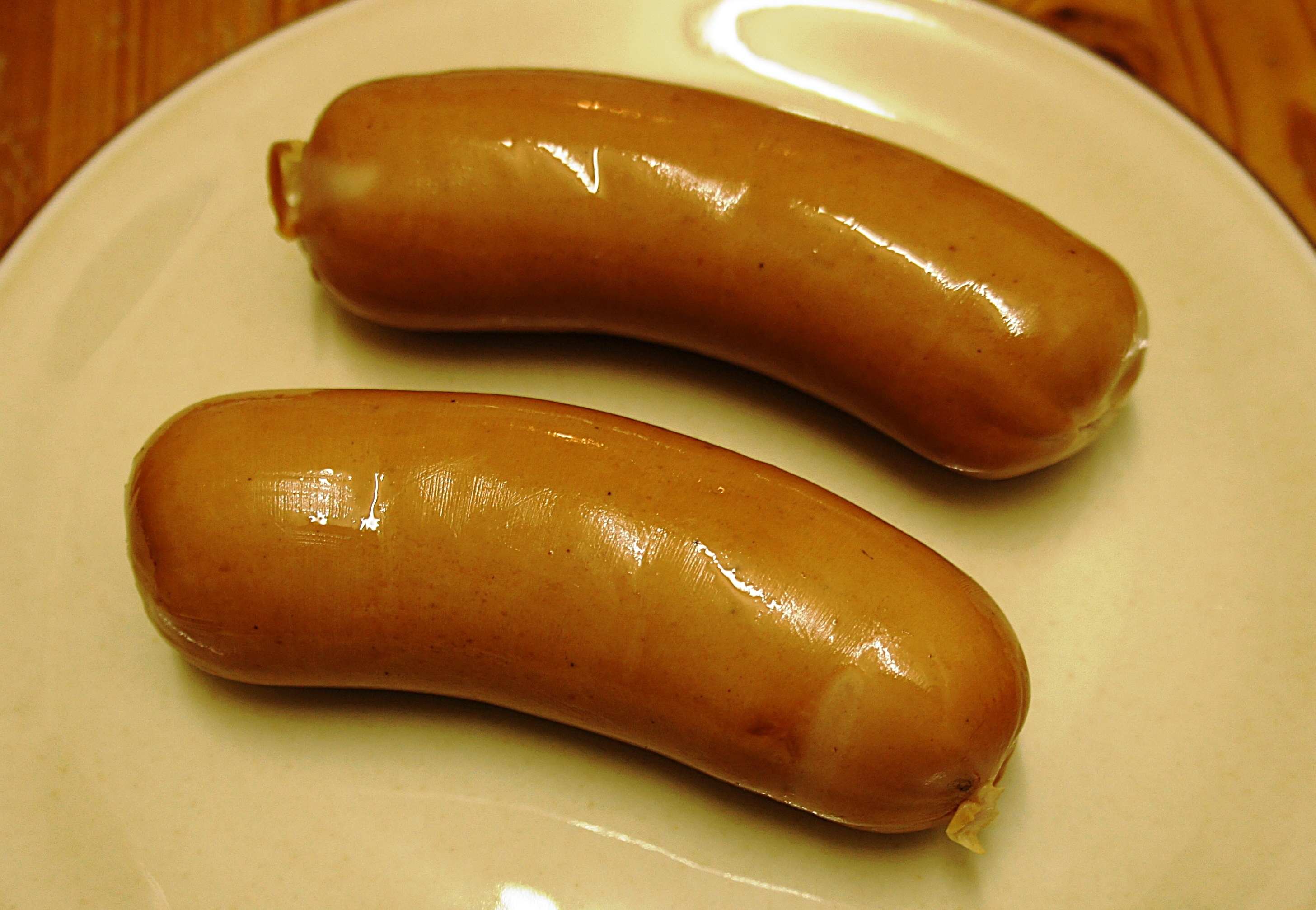 Zwei rohe Cervelats auf einem Teller.